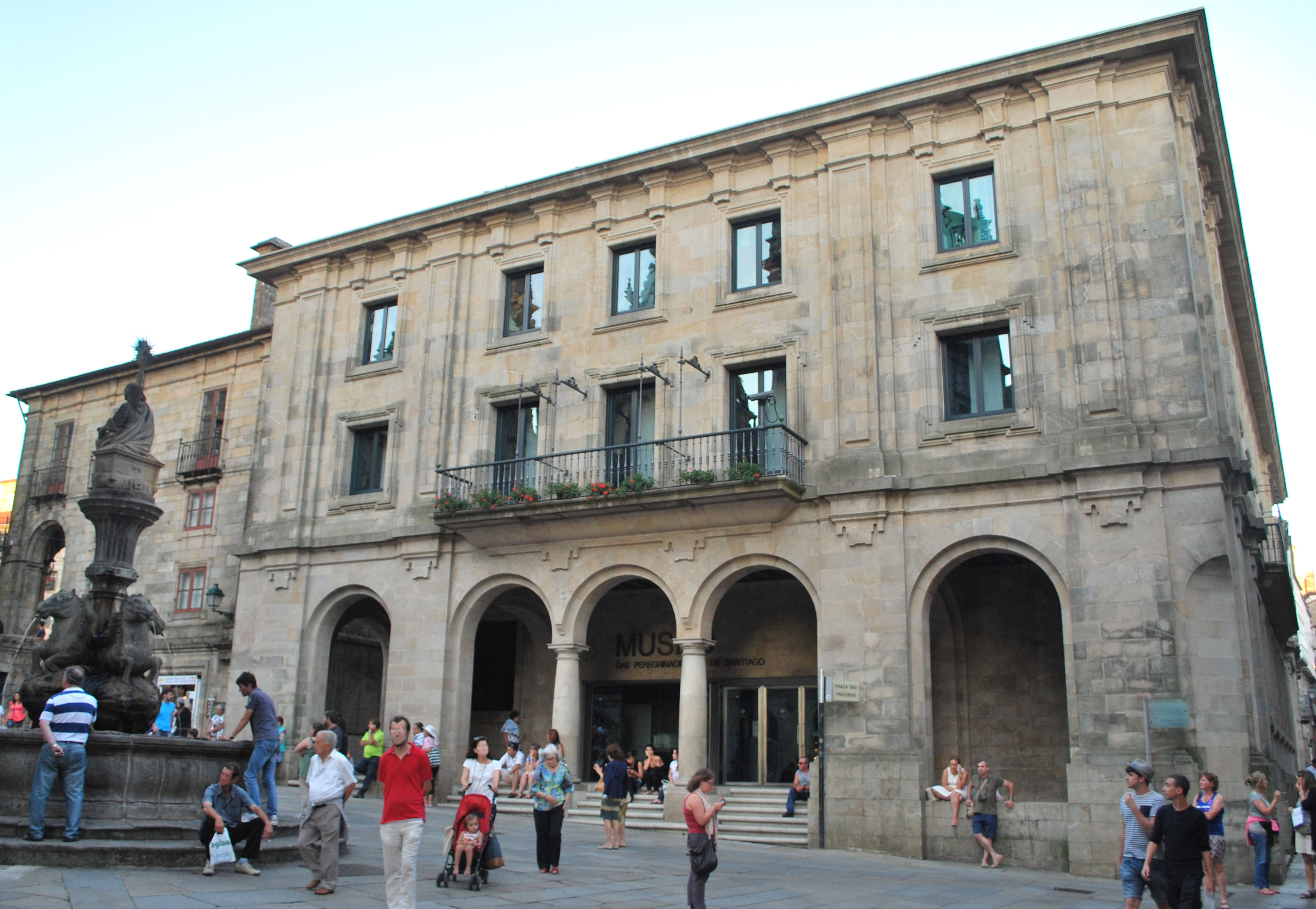 Imaxe do Museo das Peregrinacións en Santiago de Compostela A Coruña Galiza Spain